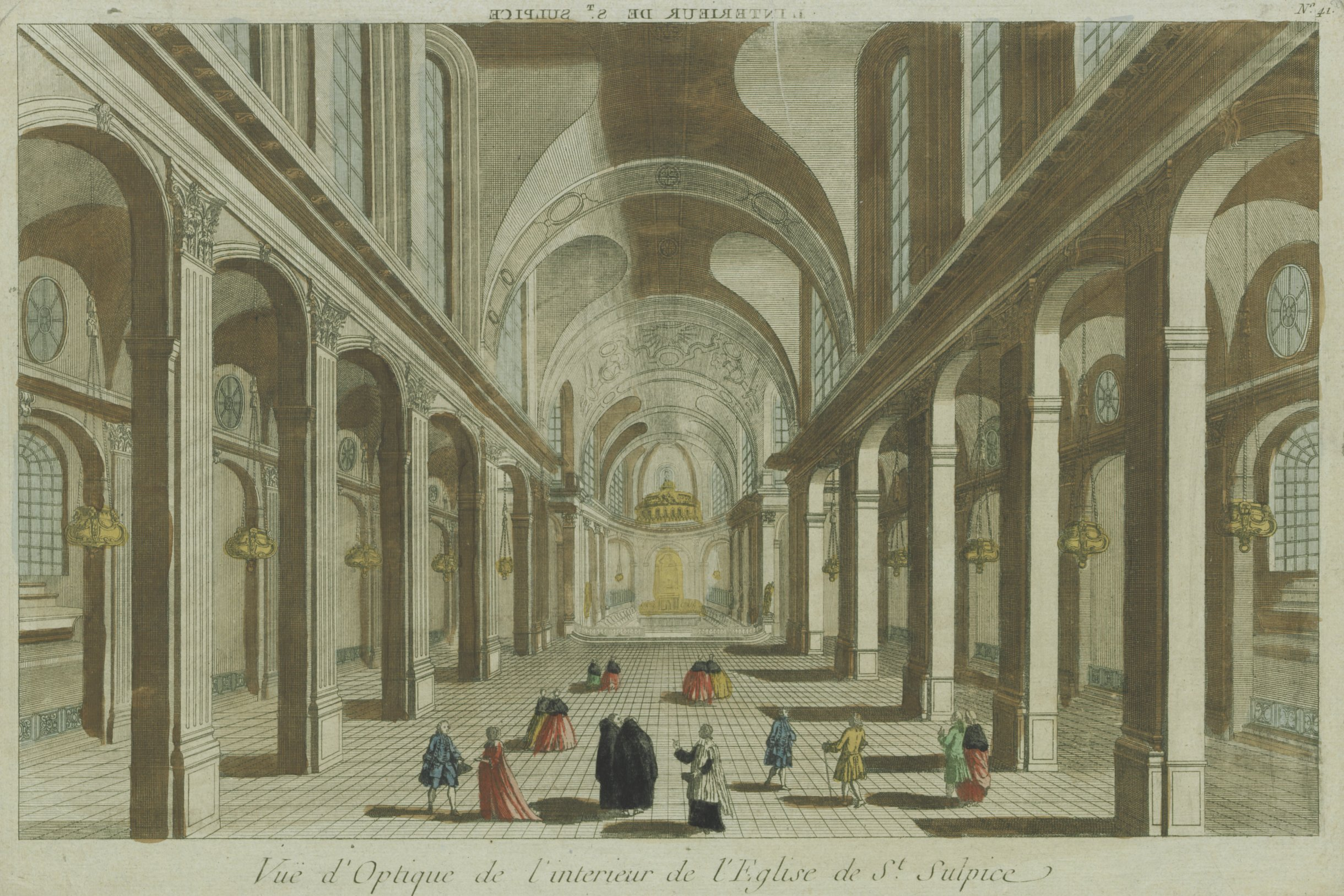 Vue d'optique de la nef de l'église Saint-Sulpice de Paris. Circa 1790.